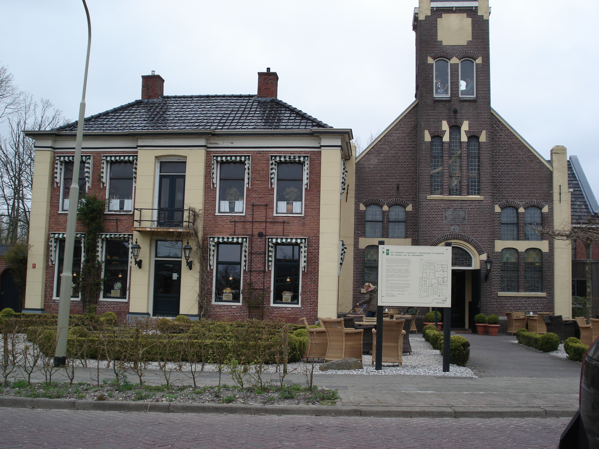 Het theemuseum zie